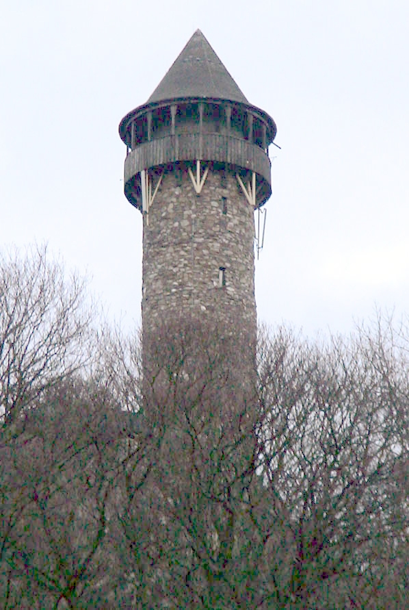 Beschreibung: Burgruine Wildenburg Quelle: Fotograf / Zeichner: Dirk O. Brückner Andere Versionen: (für die GNU FDL) (für Public Domain)